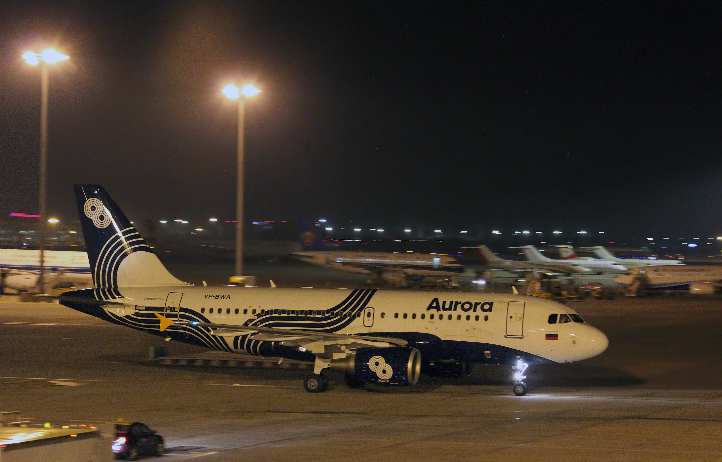 Airbus A319 авиакомпании "Аврора" в международном аэропорту Пекина